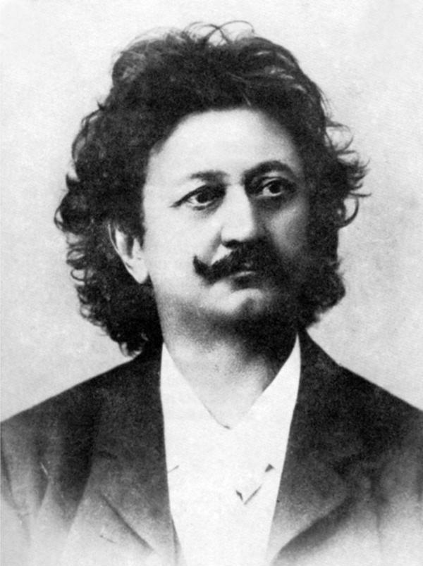 Laza Kostić (1841-1910)